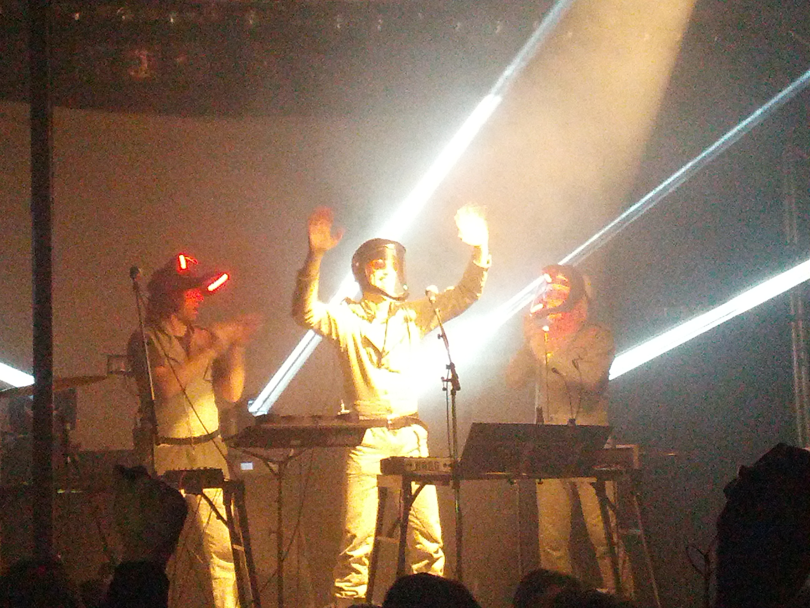 Fraktus bei einem Konzert im Beatpol in Dresden 2012